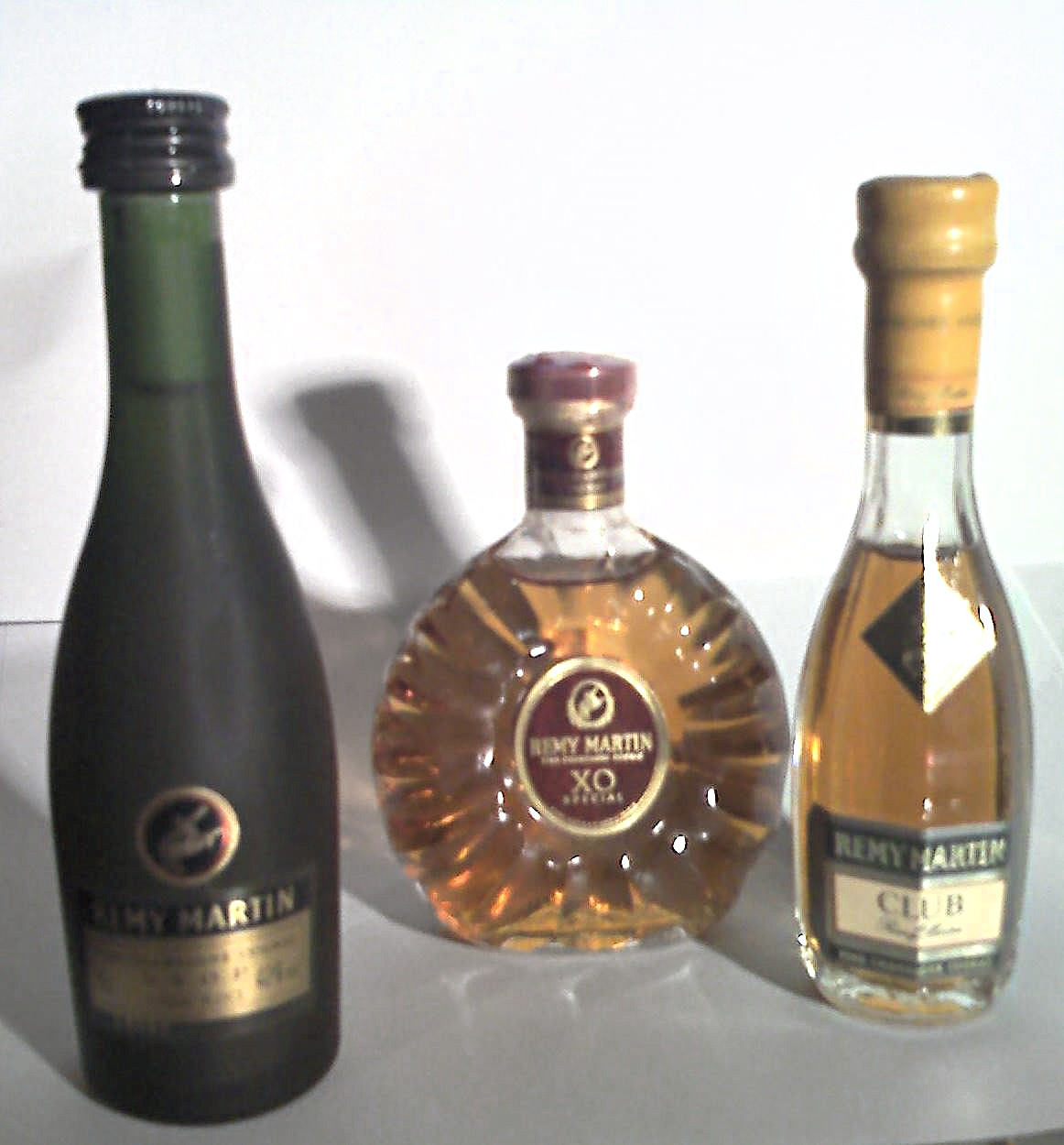 3 mal Remymartin Miniaturen VSOP, XO und Club